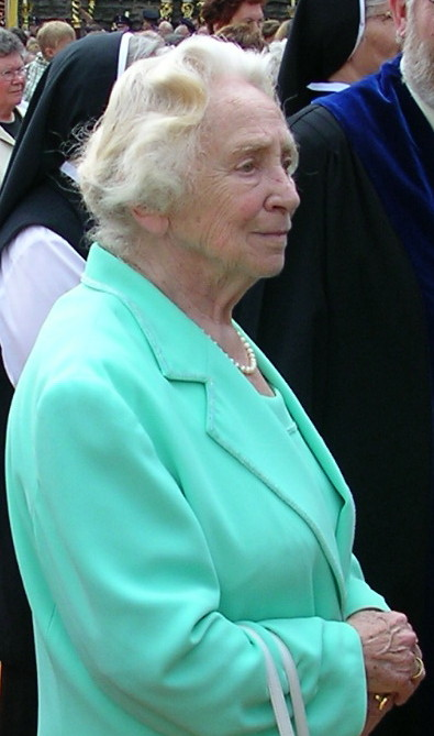 Prof. Elisabeth Roth (1920-2010) bei der Fronleichnamsprozession 2004 auf dem Bamberger Domplatz